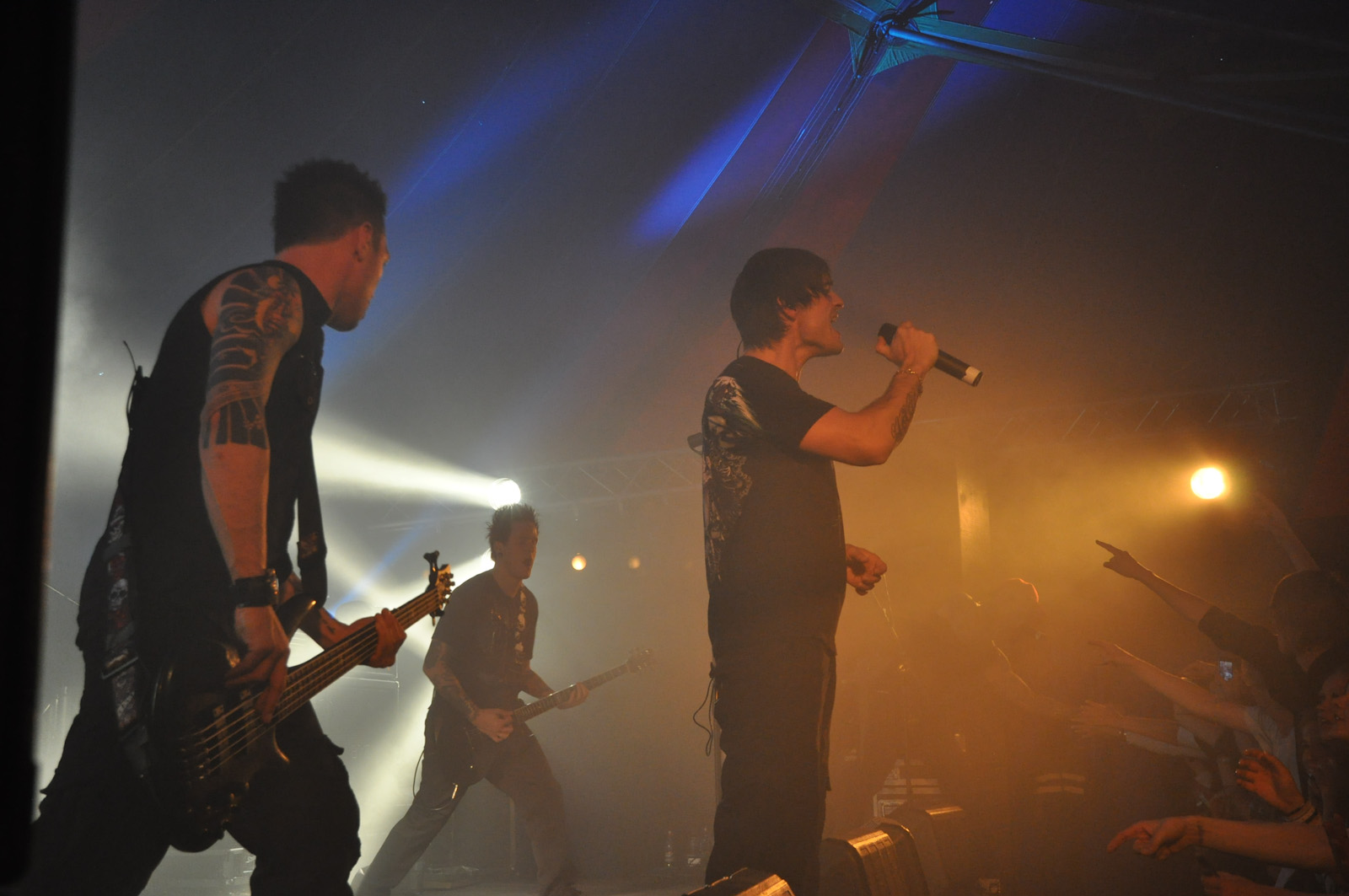 Dead by April på Spill og Grill 2010